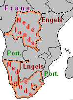 Eigen kaart